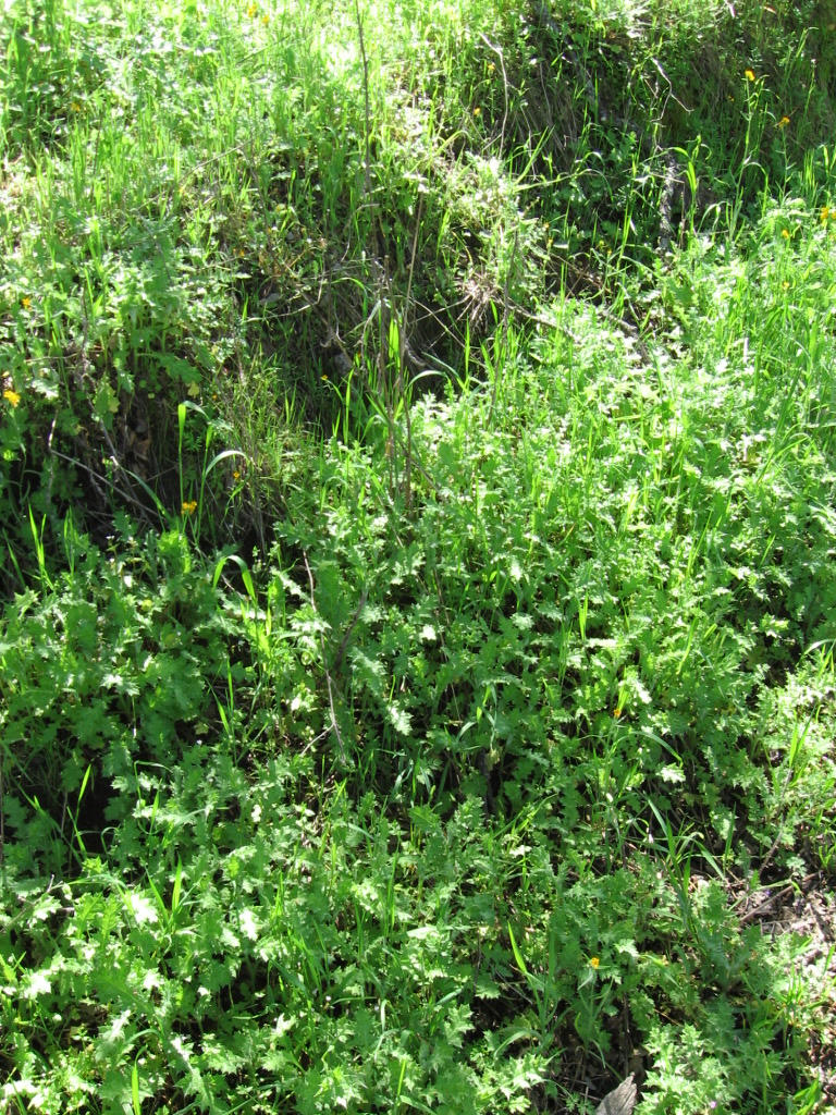 Carduus pycnocephalus